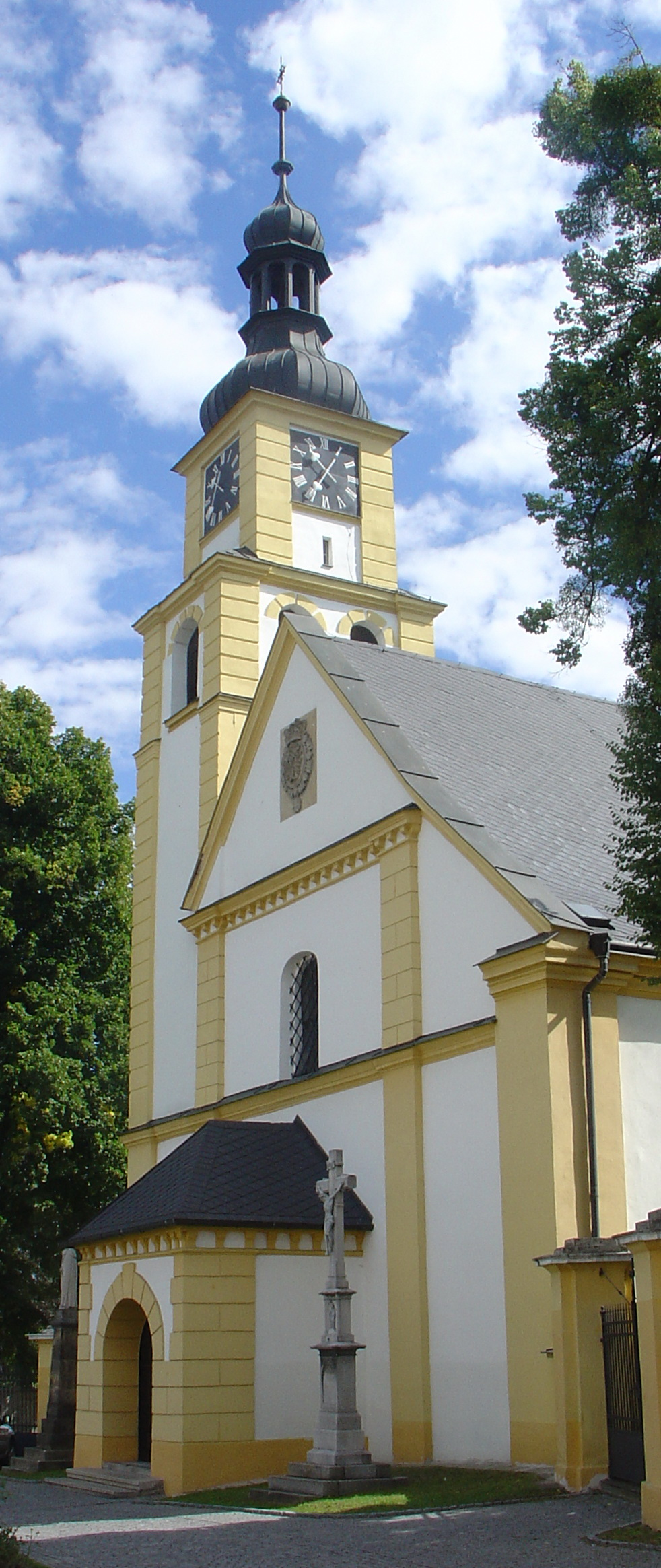 Kostel sv. Petra a Pavla (Hradec nad Moravicí), Městečko 1, Hradec nad Moravicí